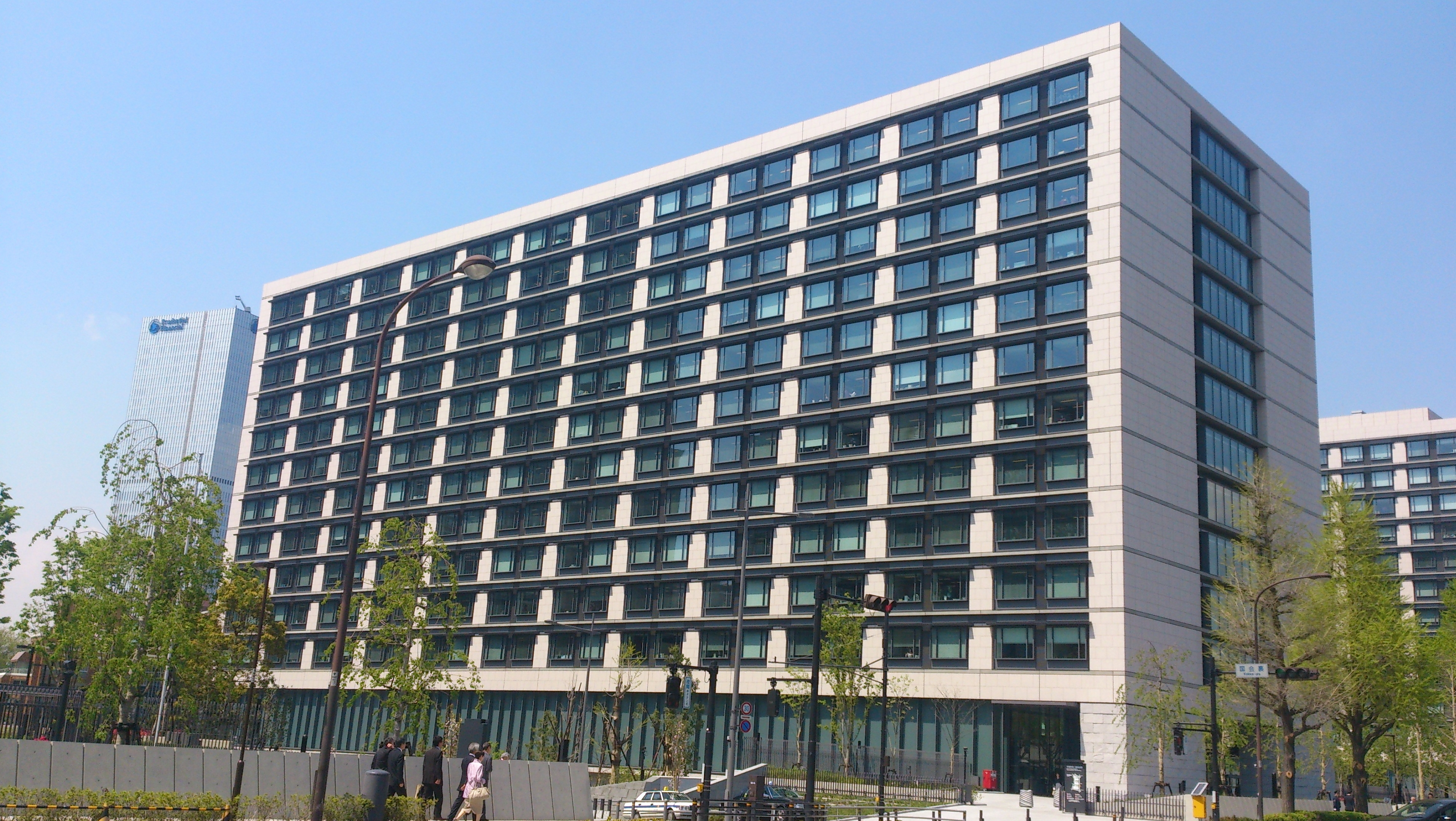 新衆議院第二議員会館の全景。